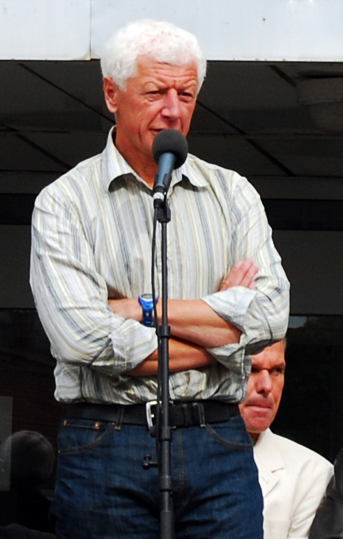 Hamars ordfører Einar Busterud driver valgkamp i gågata i Hamar.